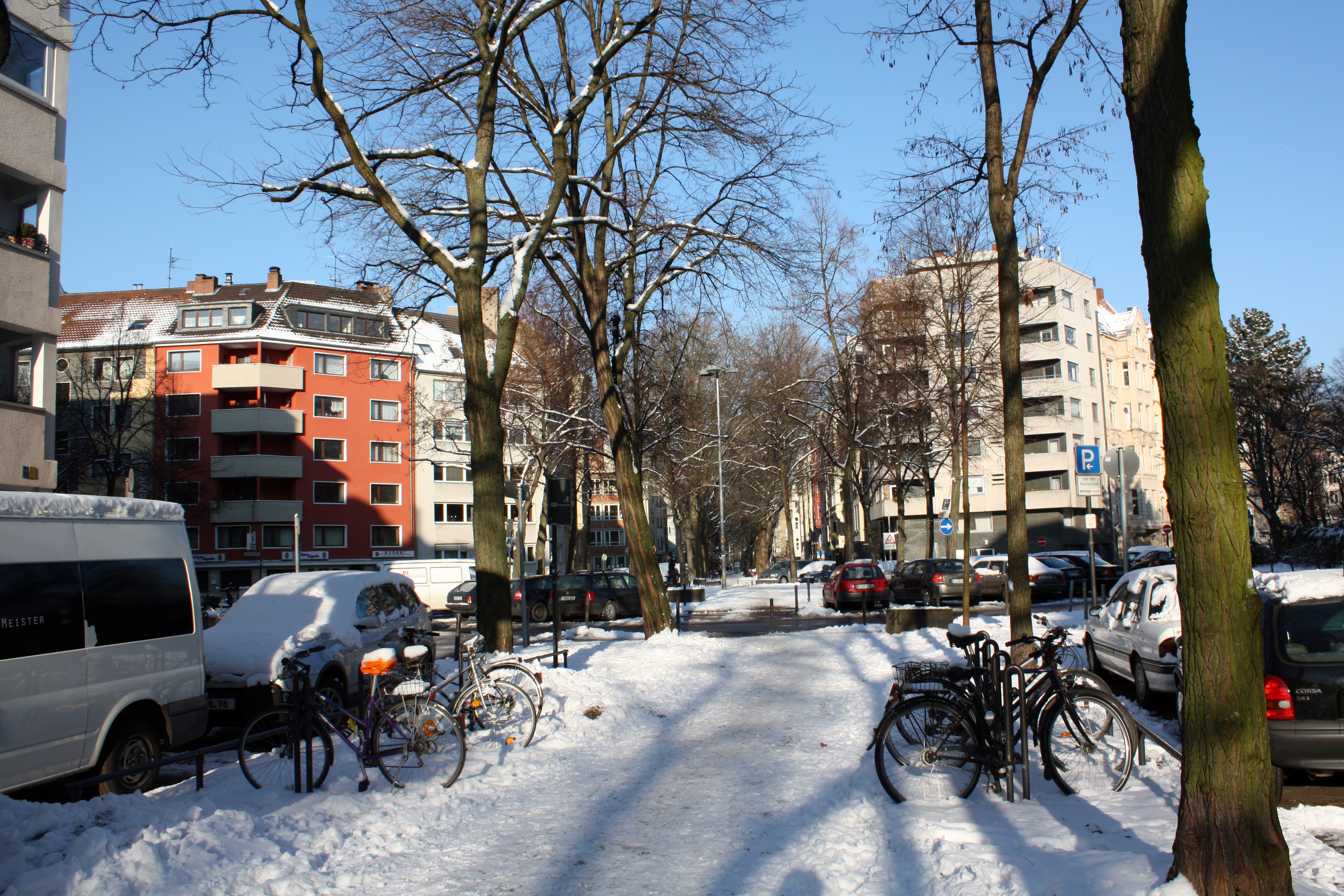 "Eierplätzchen", Köln-Südstadt